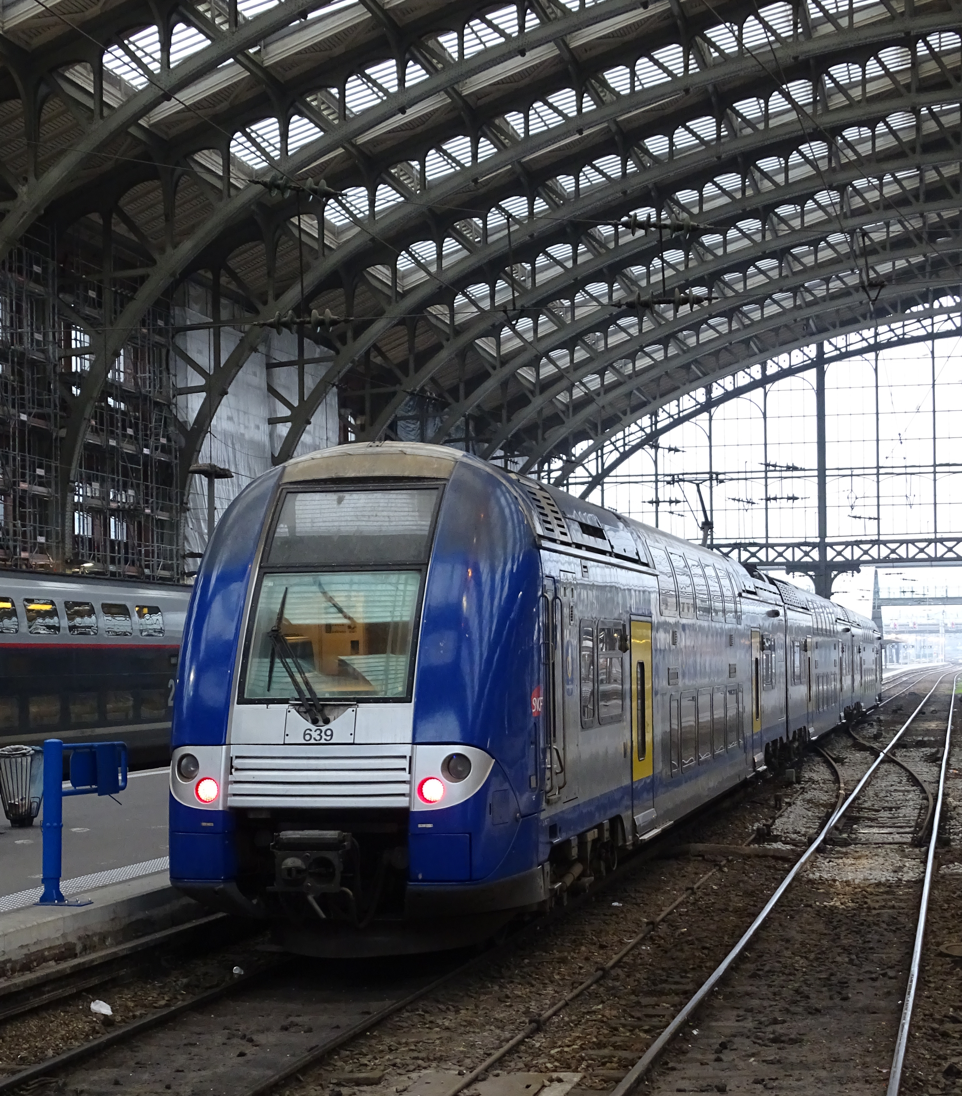 SNCF Nord Pas de Calais 639 Z24777 bij het verlaten van het station Lille Flandres (Rijsel).